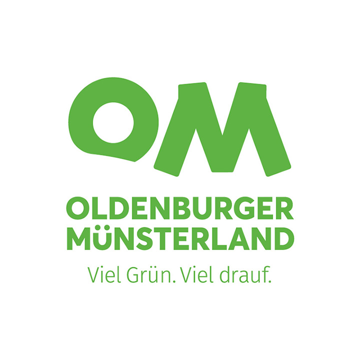 Oldenburger Münsterland Logo 2018